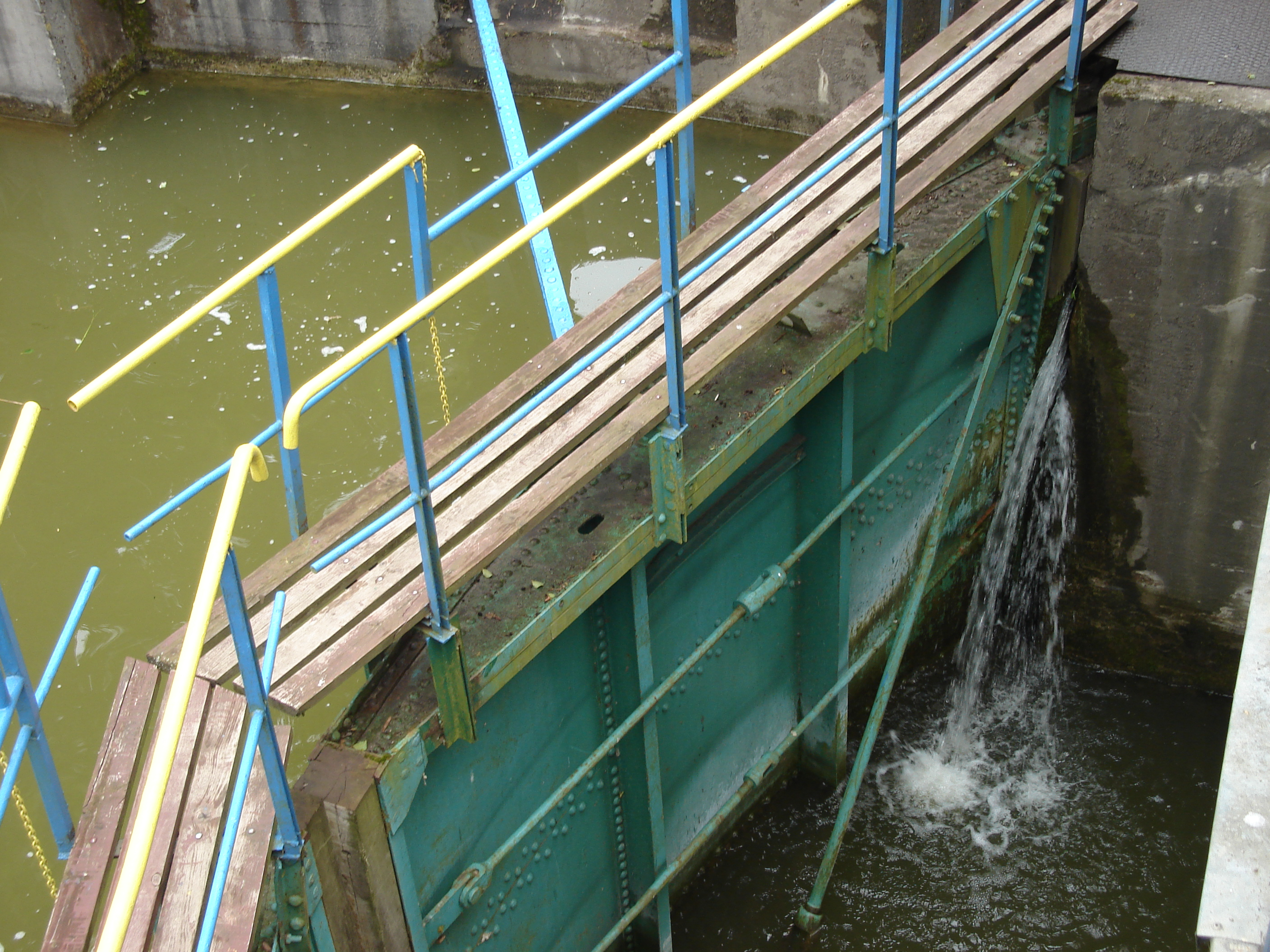 Śluza Guzianka. Różnica poziomów wody